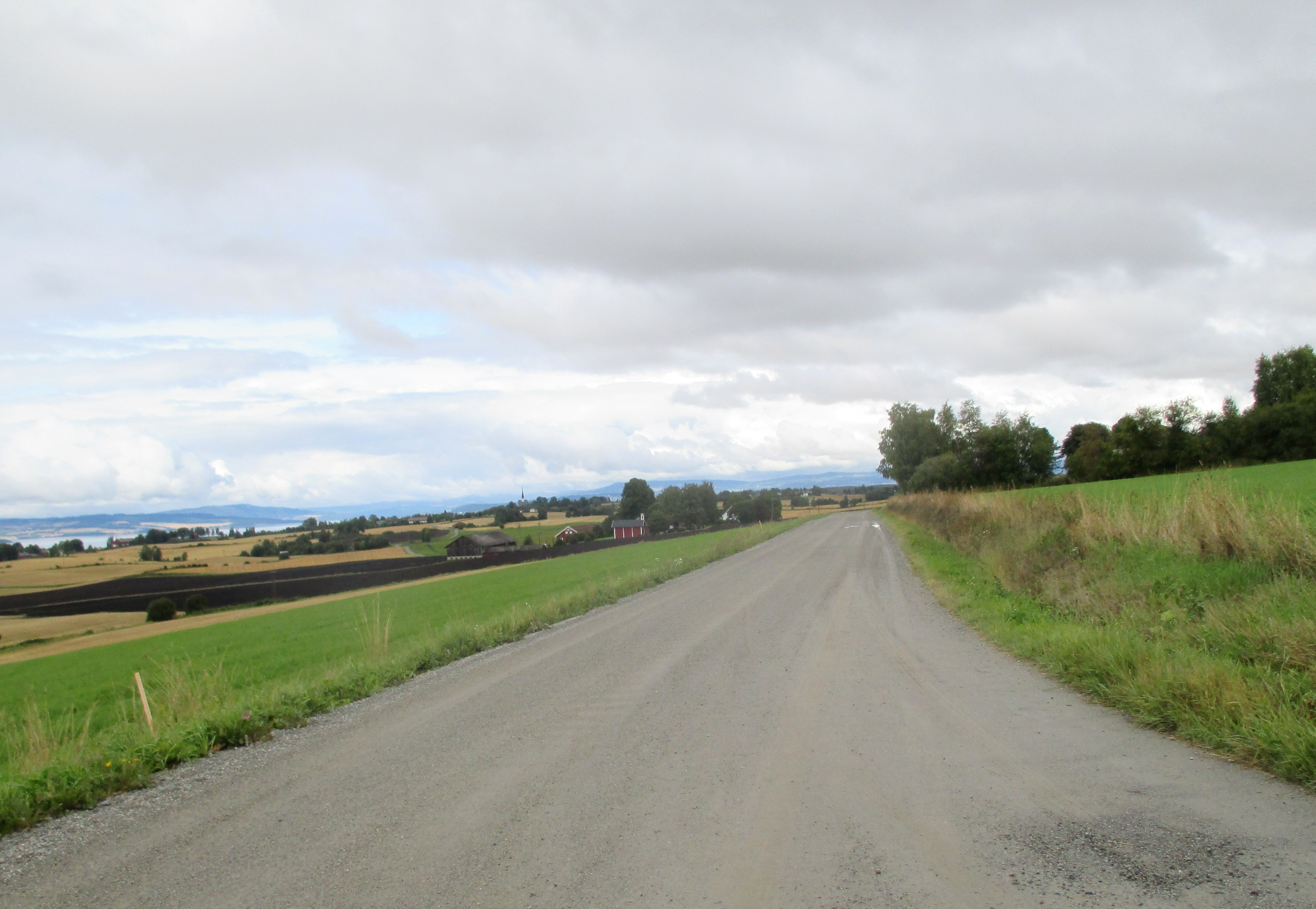 Ekebergvegen (FV1866, tidl. FV200) i Stange kommune